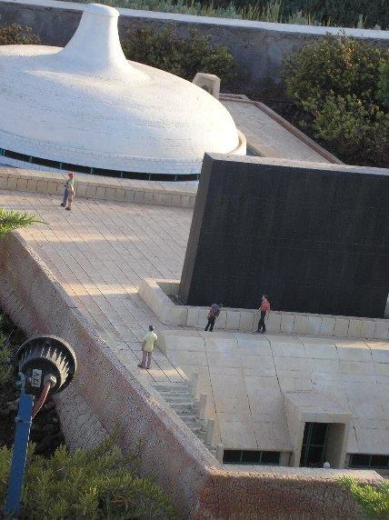 Mini Israel - Heichal Hasefer